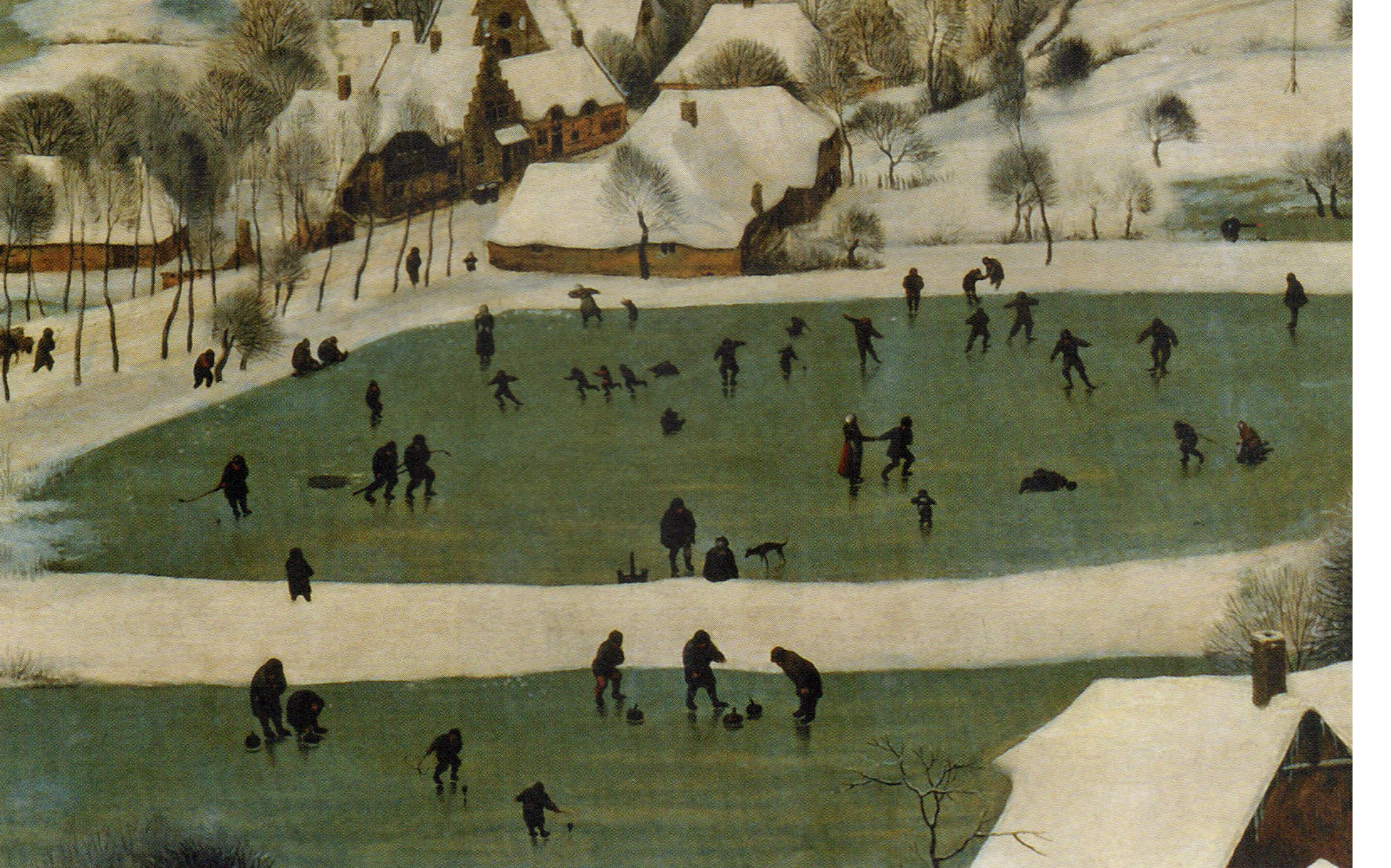 Zu sehen sind verschiedene Eissportarten aus den Niederlanden des 16. Jahrhunderts, wie Vorformen von Eishockey und Eisstockschießen, sowie Schlittschuhlaufen